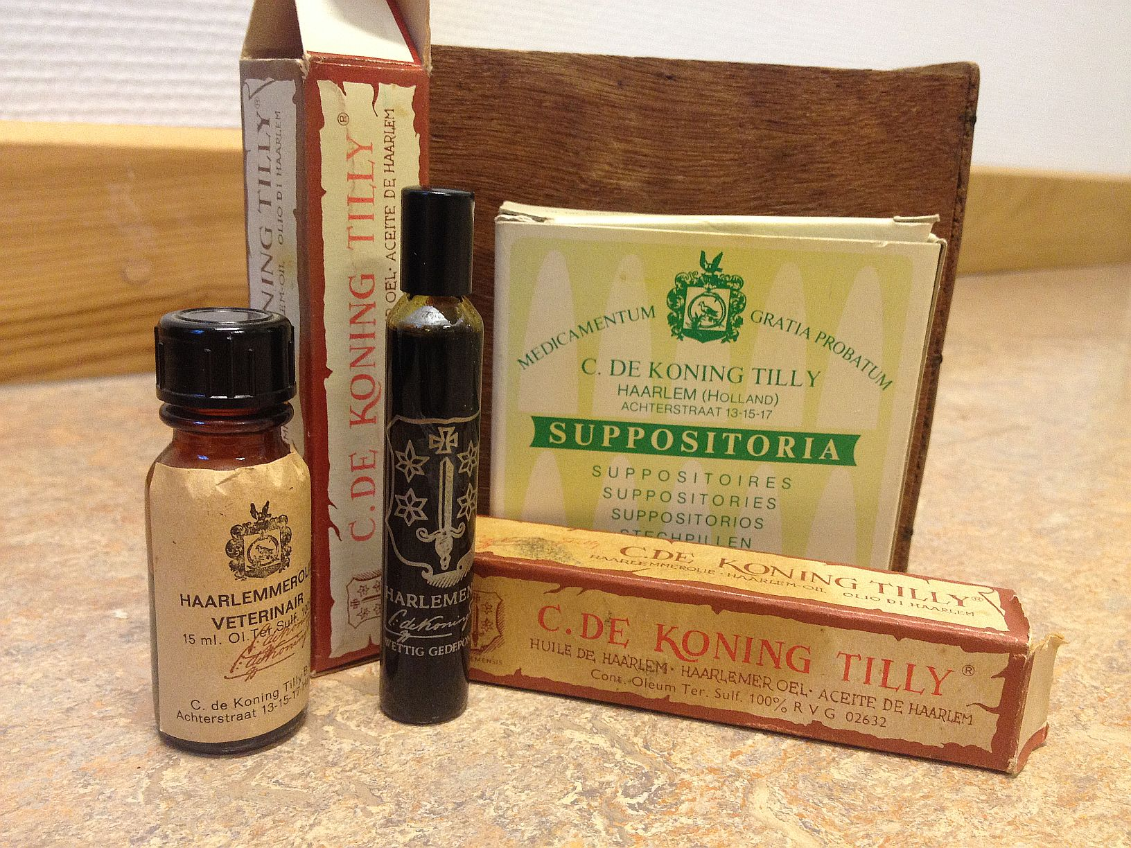 Haarlemmerolie soorten en toedieningsvormen